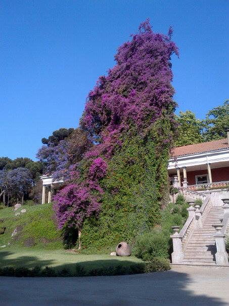 Uno de los viñedos más hermosos de Chile